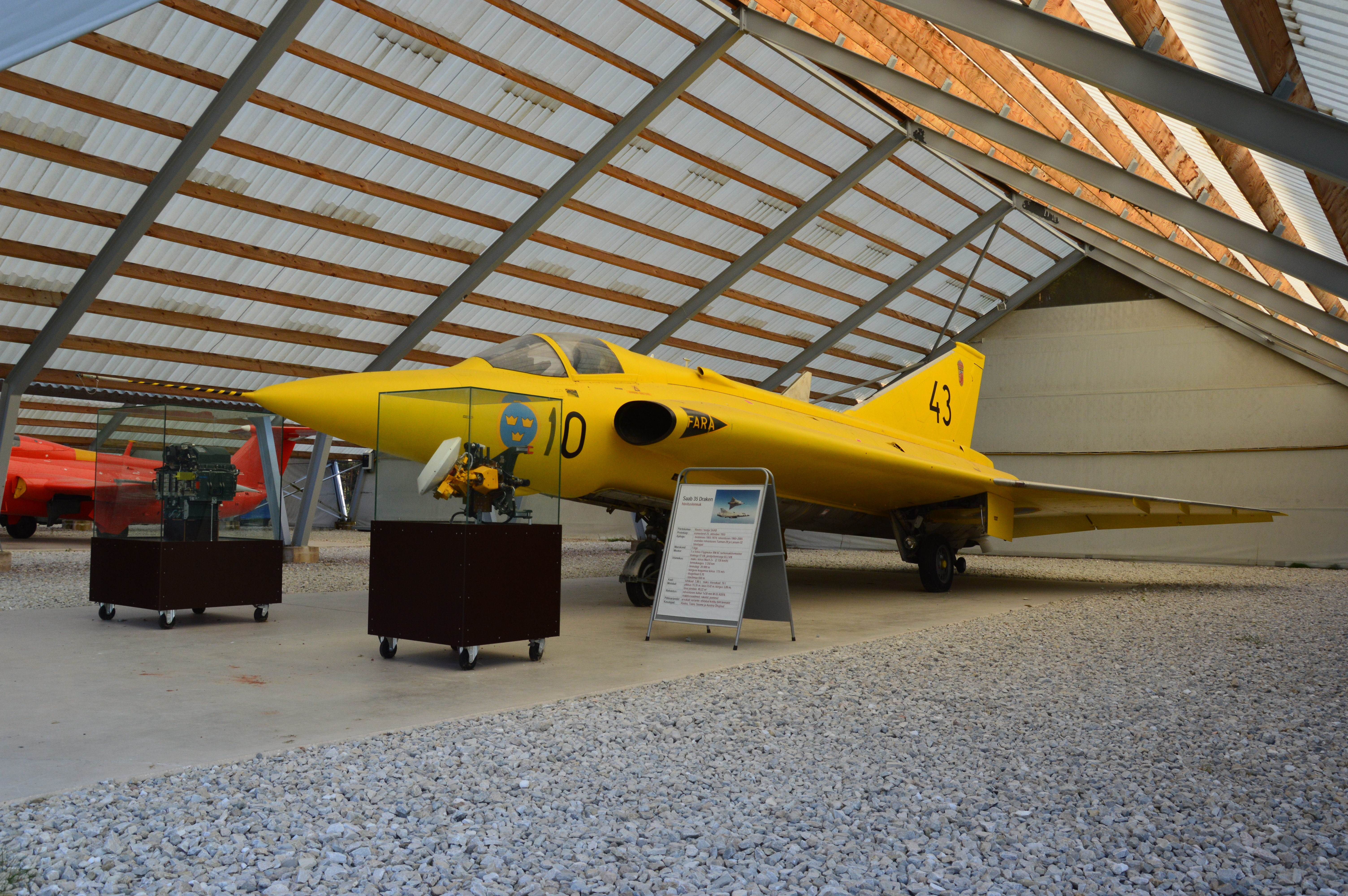 Saab 35 Draken Eesti Lennundusmuuseumis.